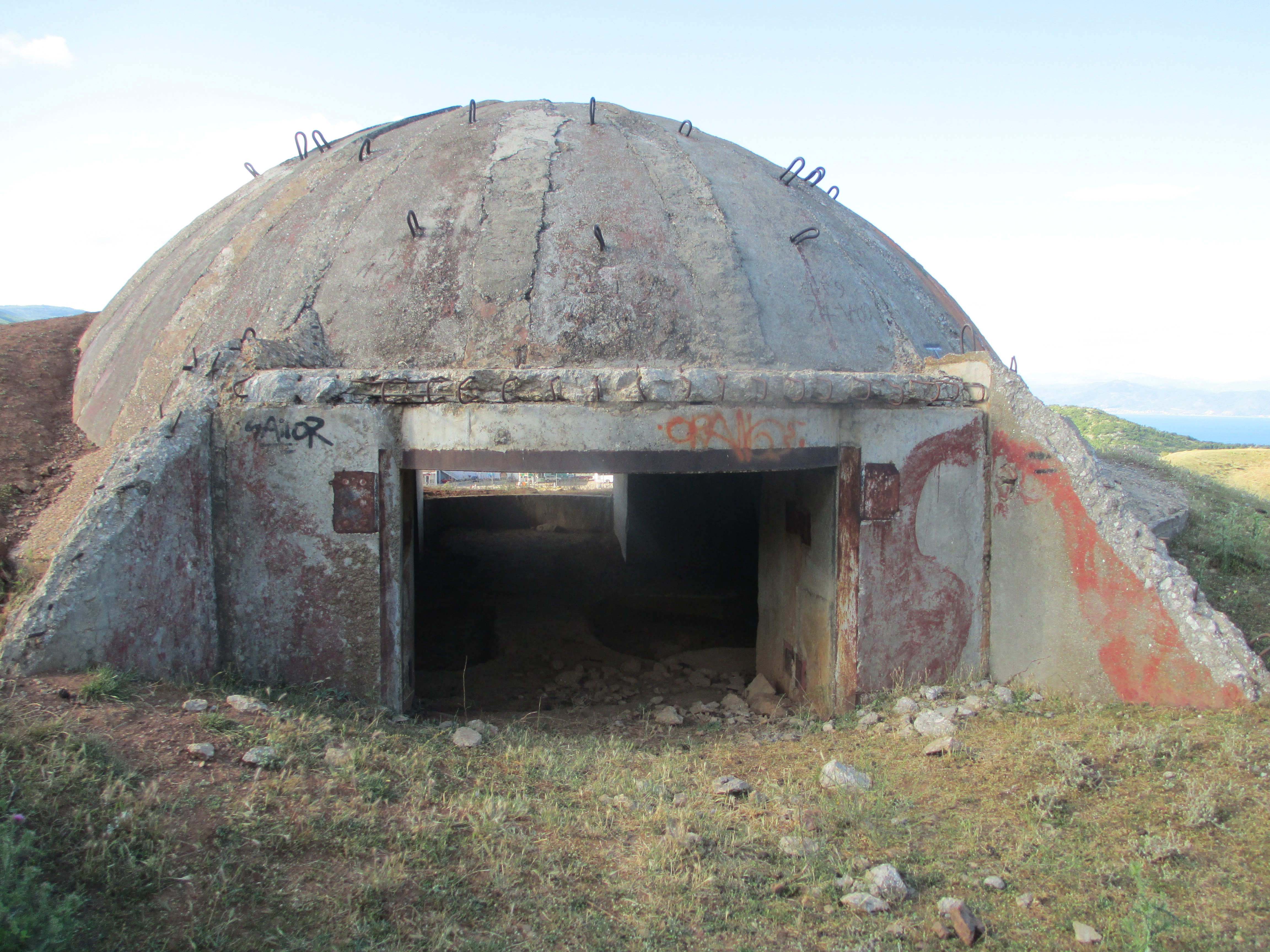 בונקר באלבניה ליד גבול מקדוניה